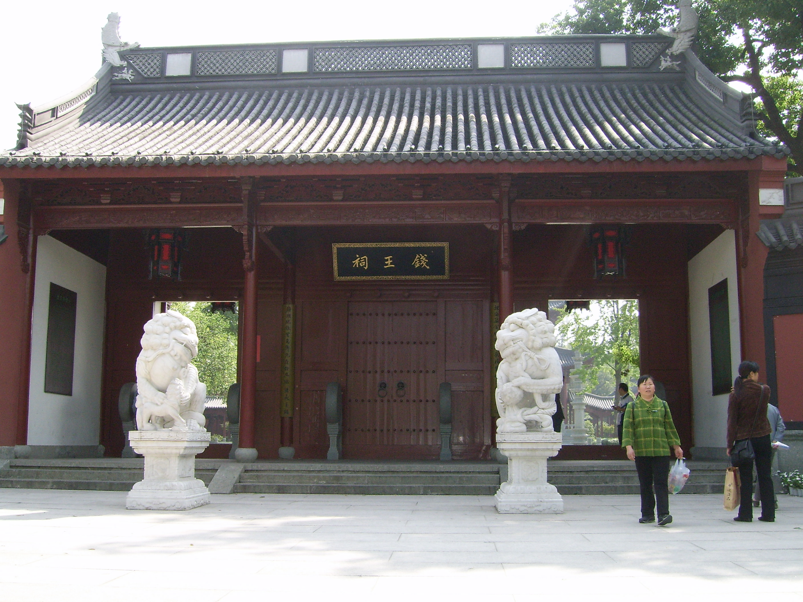 钱王祠正门，位于杭州西湖柳浪闻莺处。